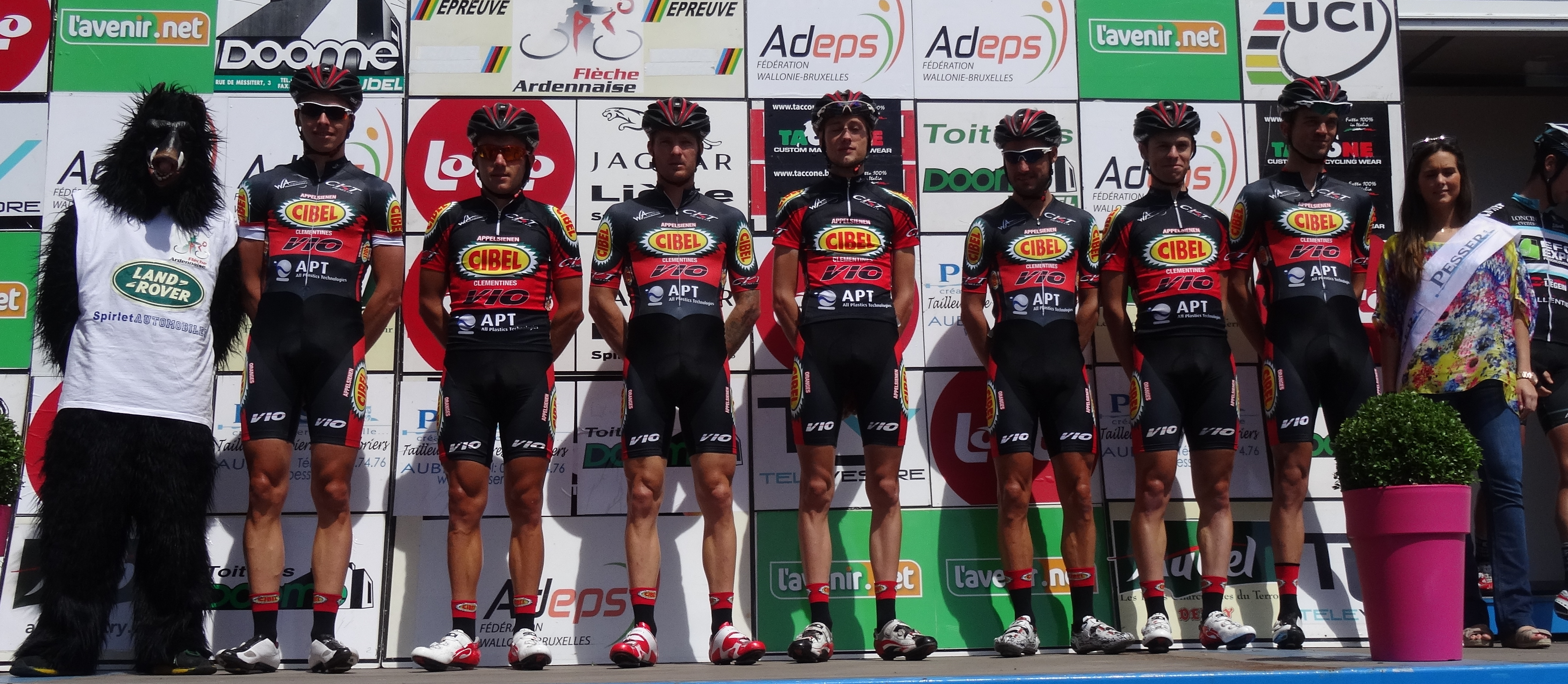 Reportage photographique réalisé le dimanche 22 juin à l'occasion du départ et de l'arrivée de la Flèche ardennaise 2014 à Herve, Belgique.